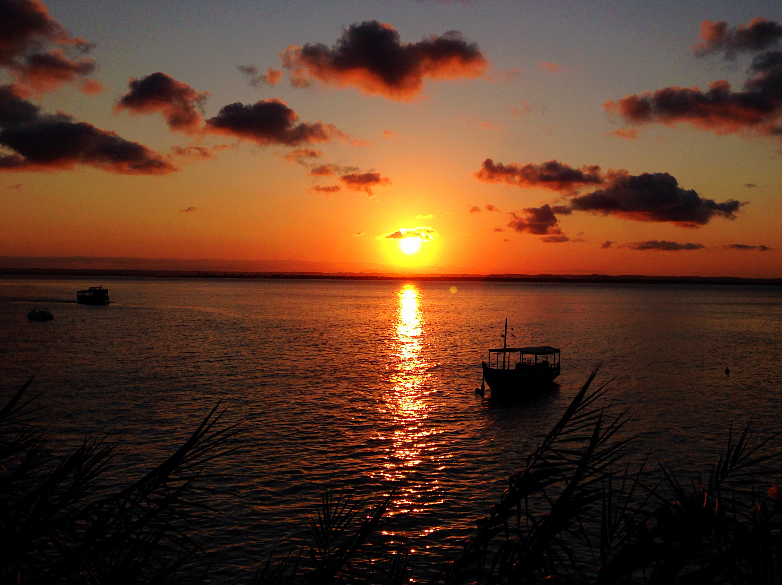 Vista do pôr-do-sol da Fortaleza de Morro do São Paulo.